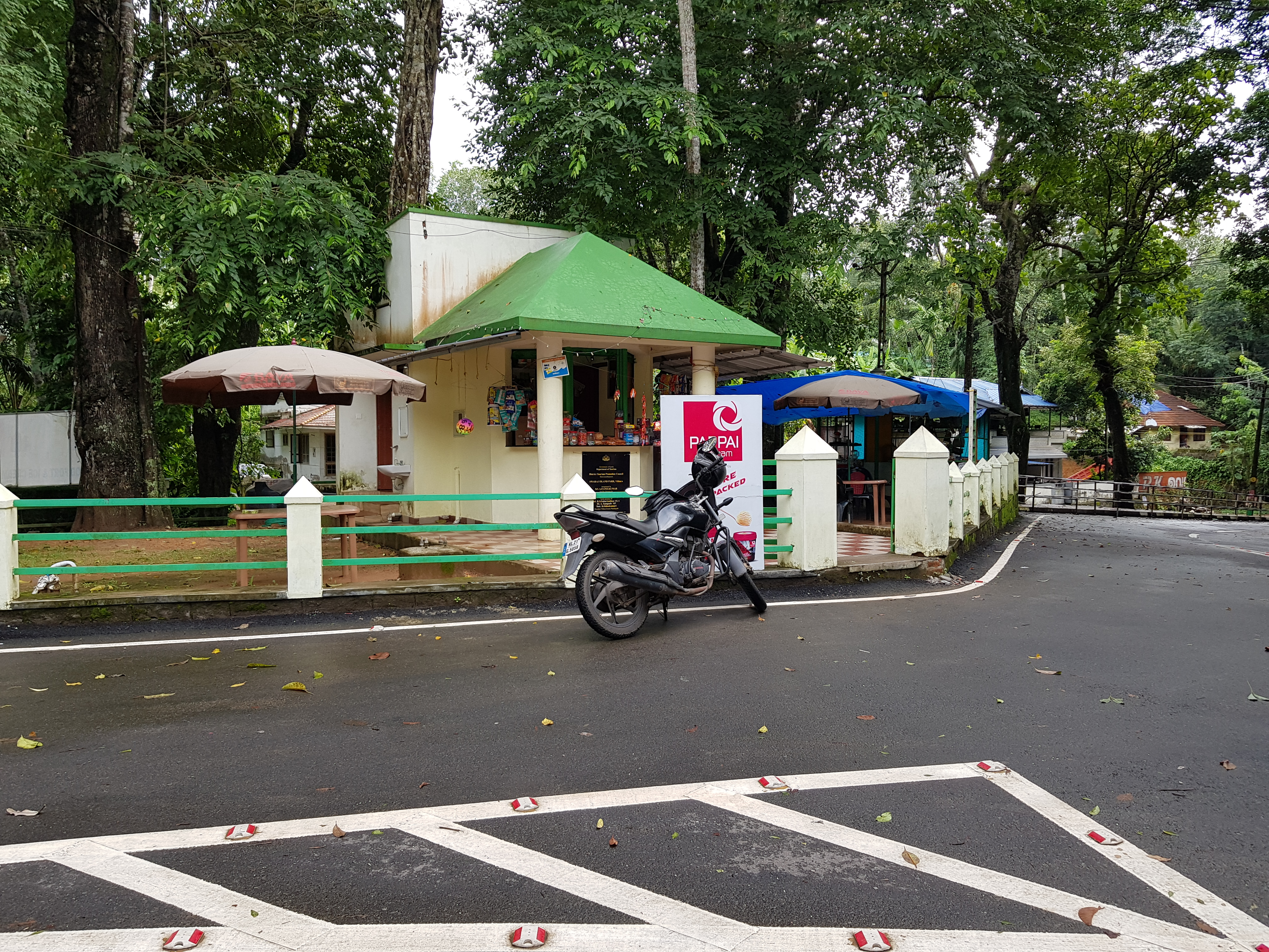 സ്വരാജ് പാർക്ക്